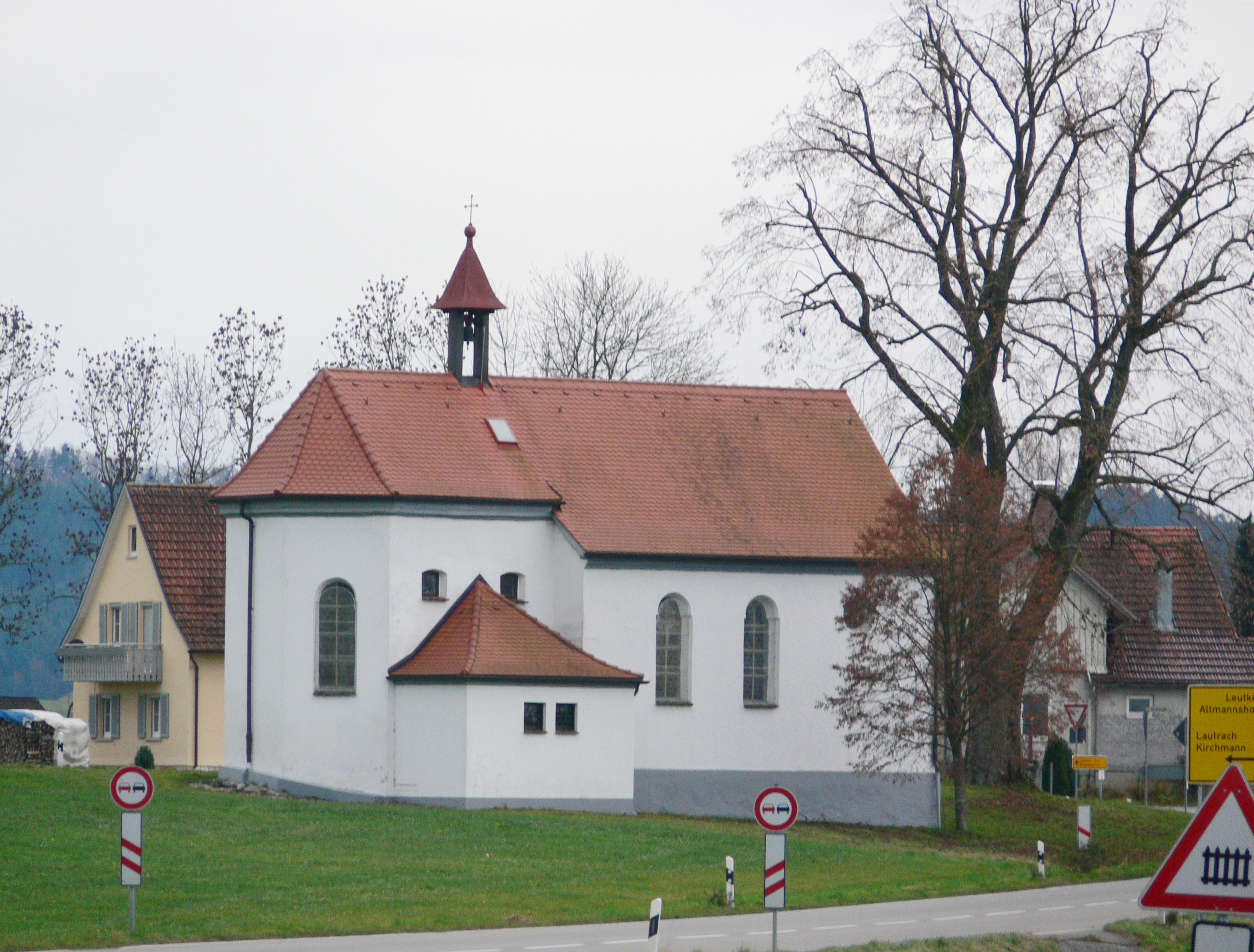 Kapelle St. Wolfgang, Aichstetten, Landkreis Ravensburg